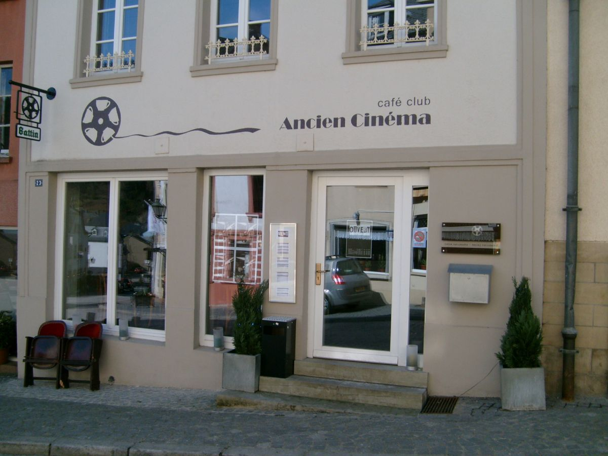 Den renovéierten ale Kino 'Ancien Cinéma' zu Veianen.